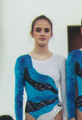 Bito Fuster en el Gimnasio Moscardó (Madrid) en 1991.